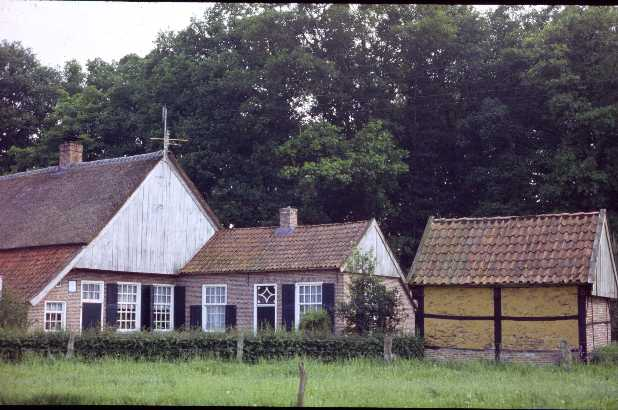 Een dia van de Brager uit de zeventiger jaren. Gemaakt door Gerrit Reekers.